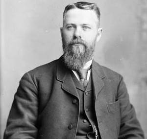 Moffat, Robert (M. P.) (Restigouche, N. B.) Mar. 5, 1844 - 1887